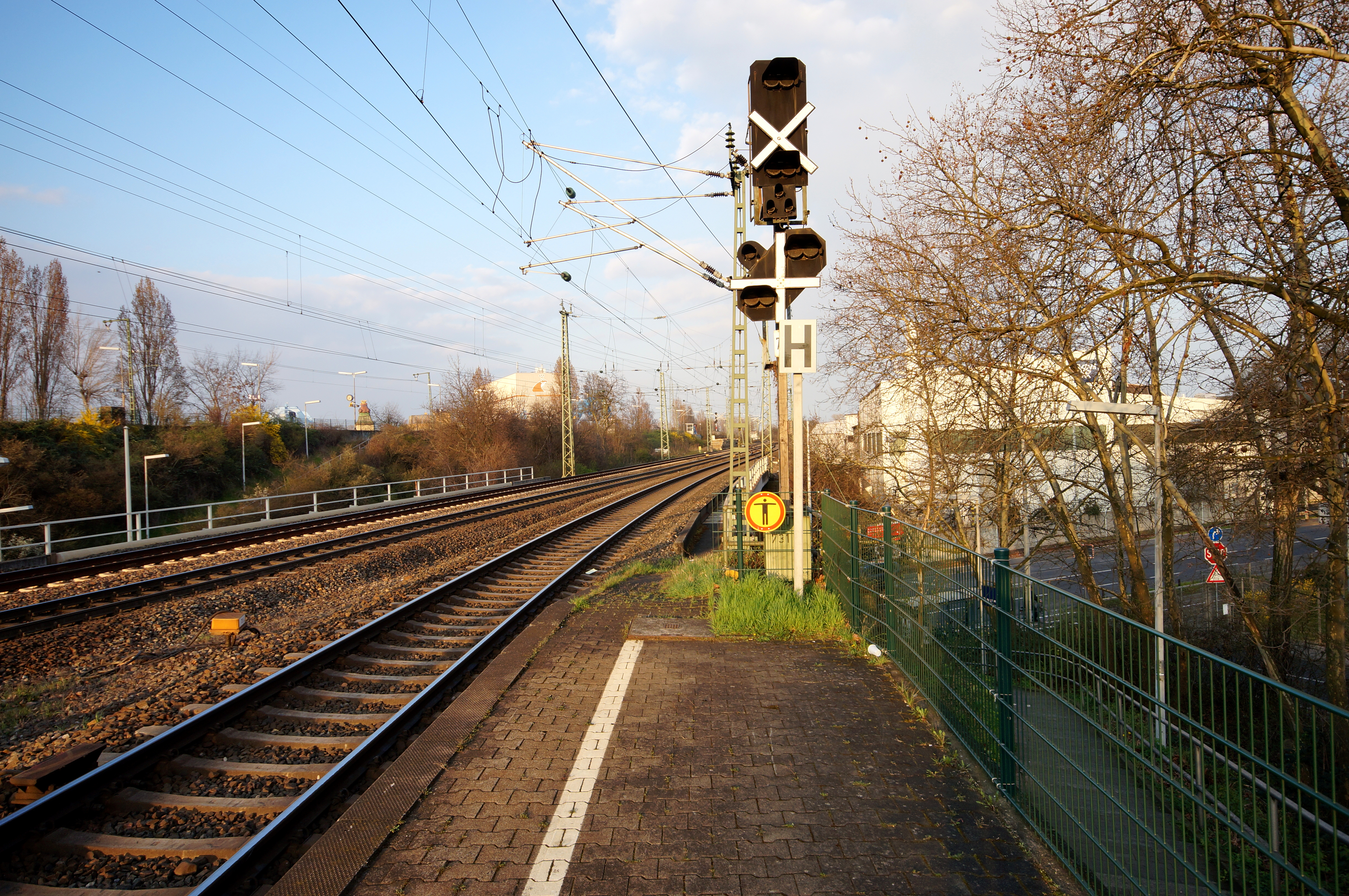 Das mit einem weißen Kreuz mit schwarzem Rand gekennzeichnete ungültige Blocksignal 731 an der Abzweigstelle Kaiserbrücke West. Westlich des Blocksignals 731 befindet sich der Bahnsteig zum Gleis 1 der Haltestelle Mainz Nord. Diese Form der Signalungültigkeit steht in der Ril 301 (Signalbuch) der DB Netz AG (301.0002.9). Im Hintergrund Froschturm und Lagergebäude von Werner & Mertz.